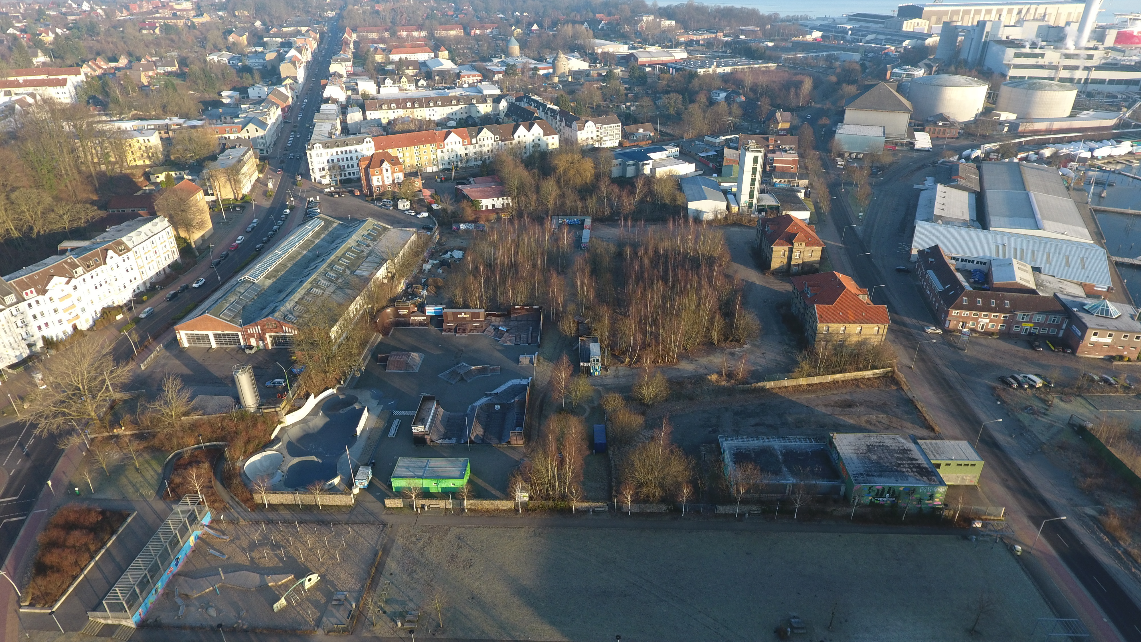 Blick auf den Flensburger Schlachthof. Eine von Jugendlichen Selbst verwaltete Skate und BMX Anlage in Traegerschaft der Sportpiraten Flensburg.